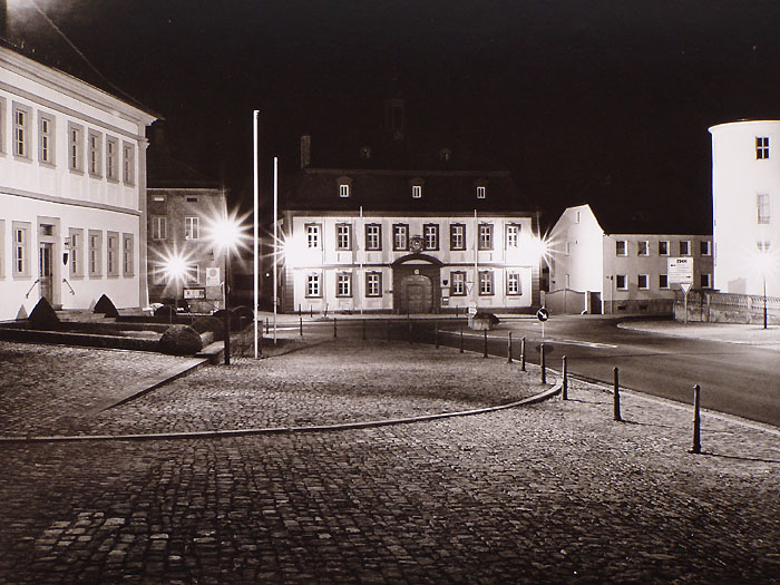 Wiesentheid: Rathaus, Schloss und historisches Pfarrhaus bei Nacht